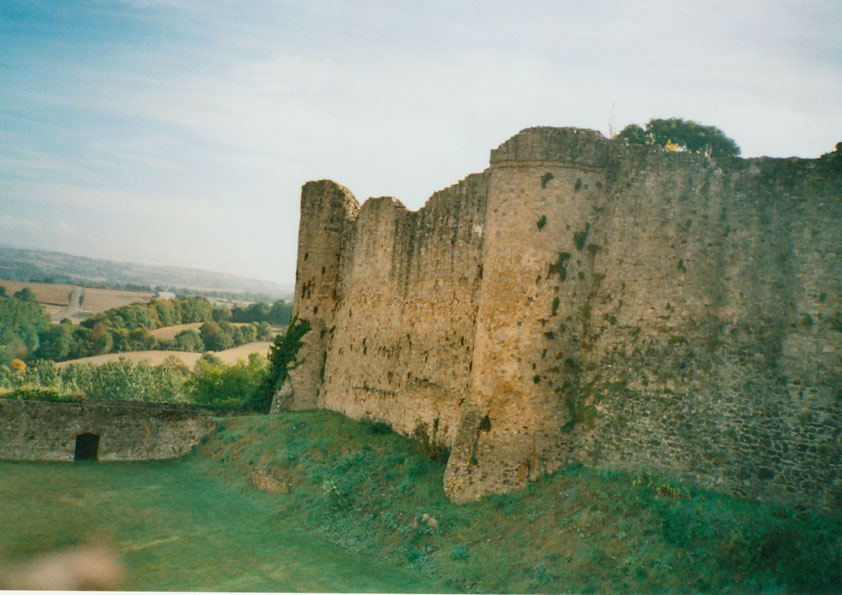 Remparts nord-ouest du château à Sainte-Suzanne (Mayenne)